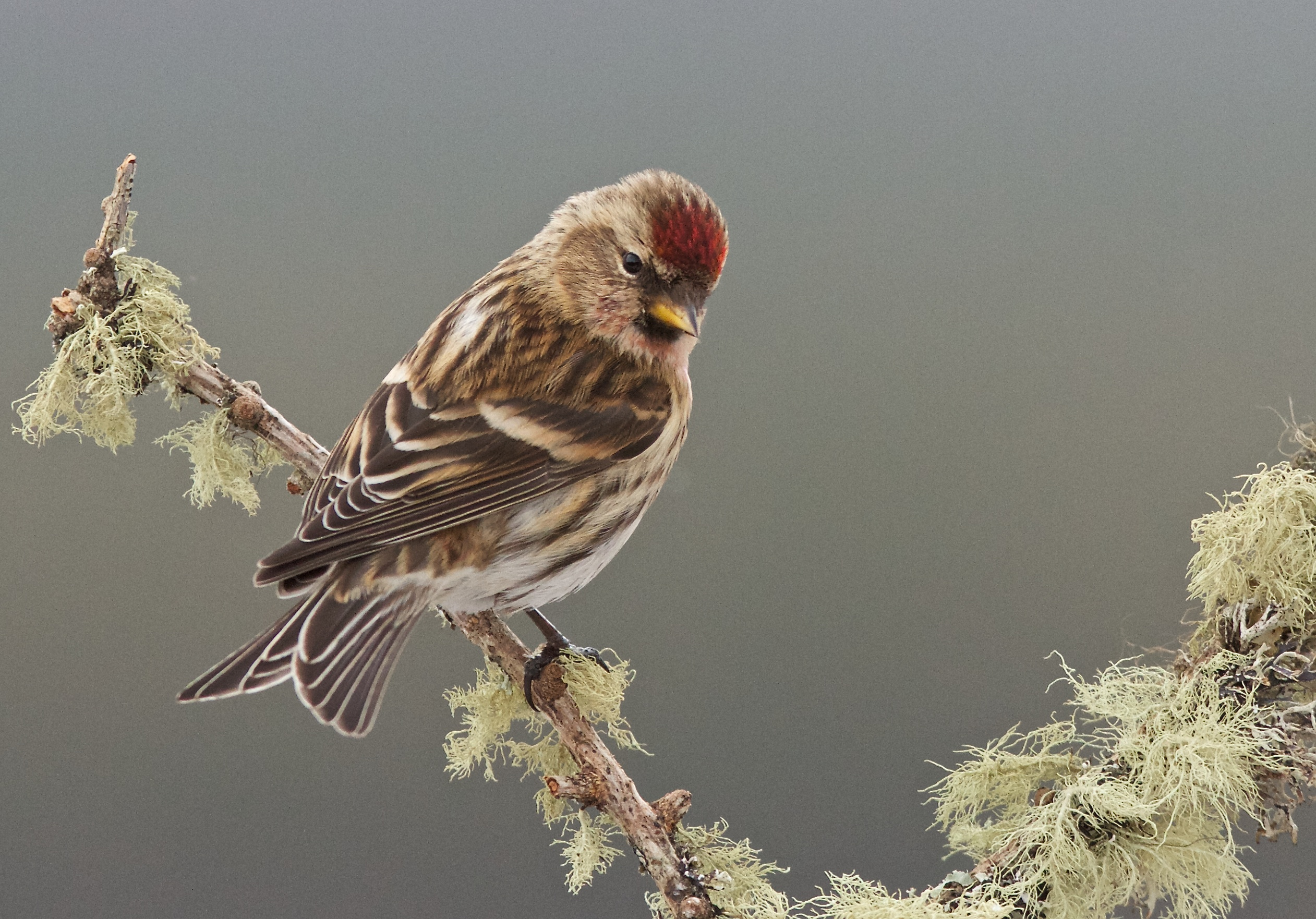 Glenfeshie